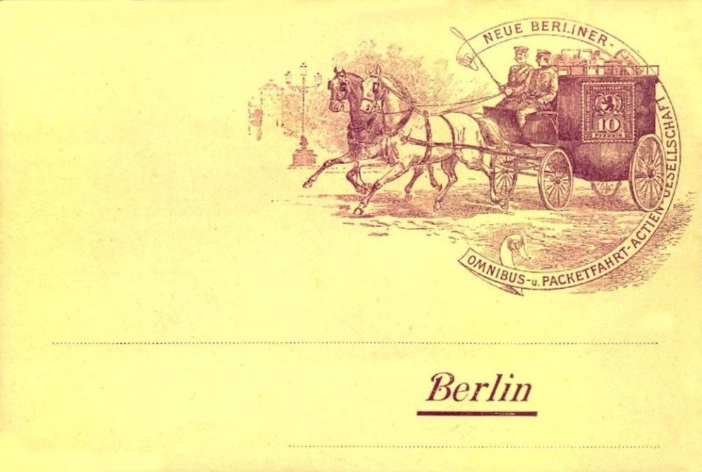 Ganzsache der Neuen Berliner Omnibus- und Packetfahrt Actien-Gesellschaft